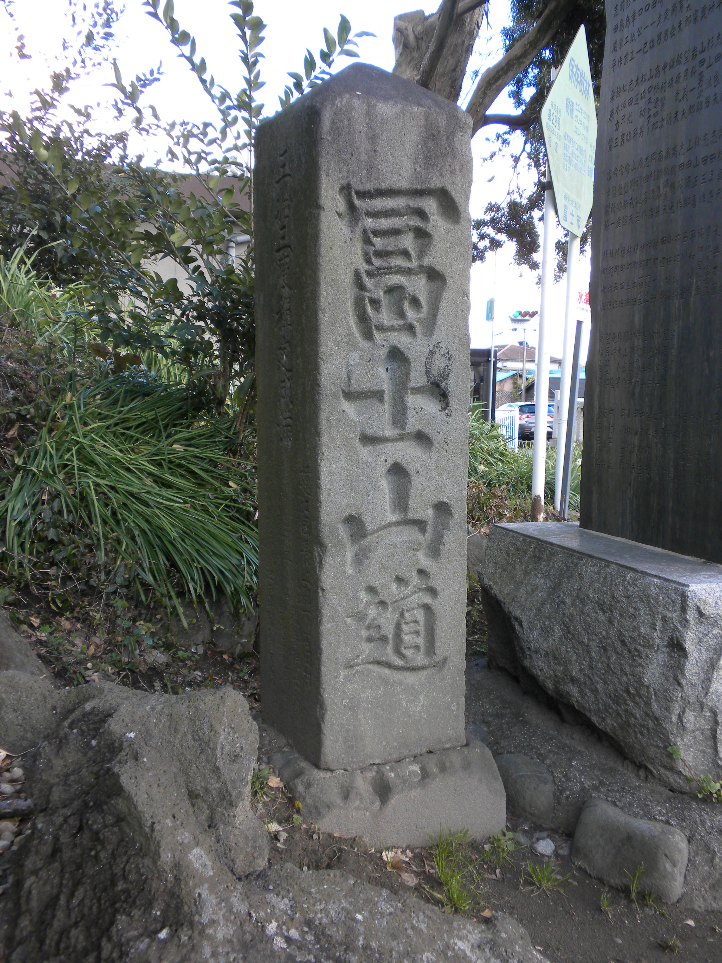 水神社（静岡県富士市松岡）境内にある道標